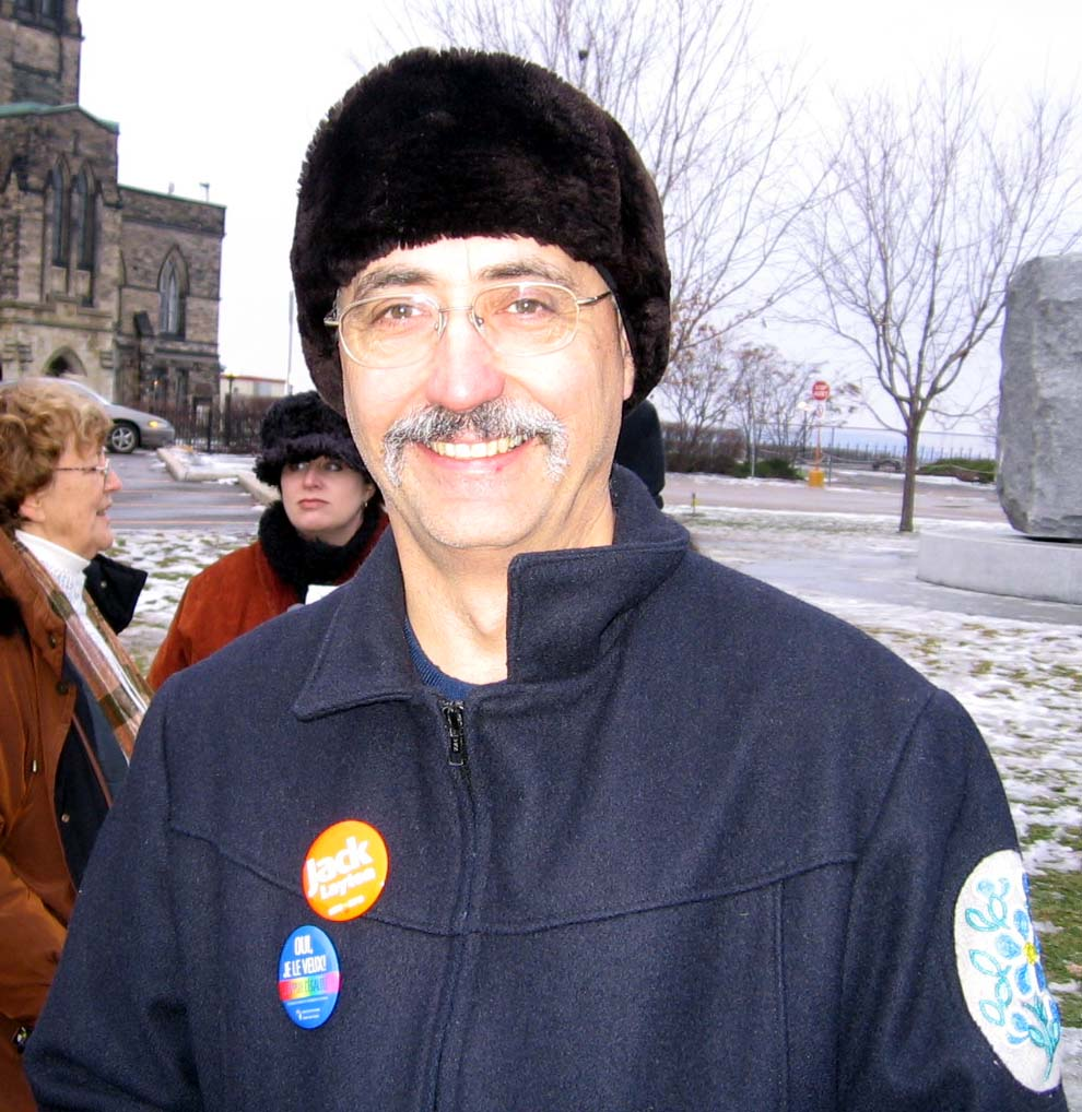 Dennis Bevington, New Democratic member of Parliament for Western Arctic, at a protest for Status of Women on Parliament Hill, December 2006. Dennis Bevington, député néo-démocrate pour Western Arctic, lors d'une manifestation pour la Condition féminine sur la Colline parlementaire, décembre 2006.